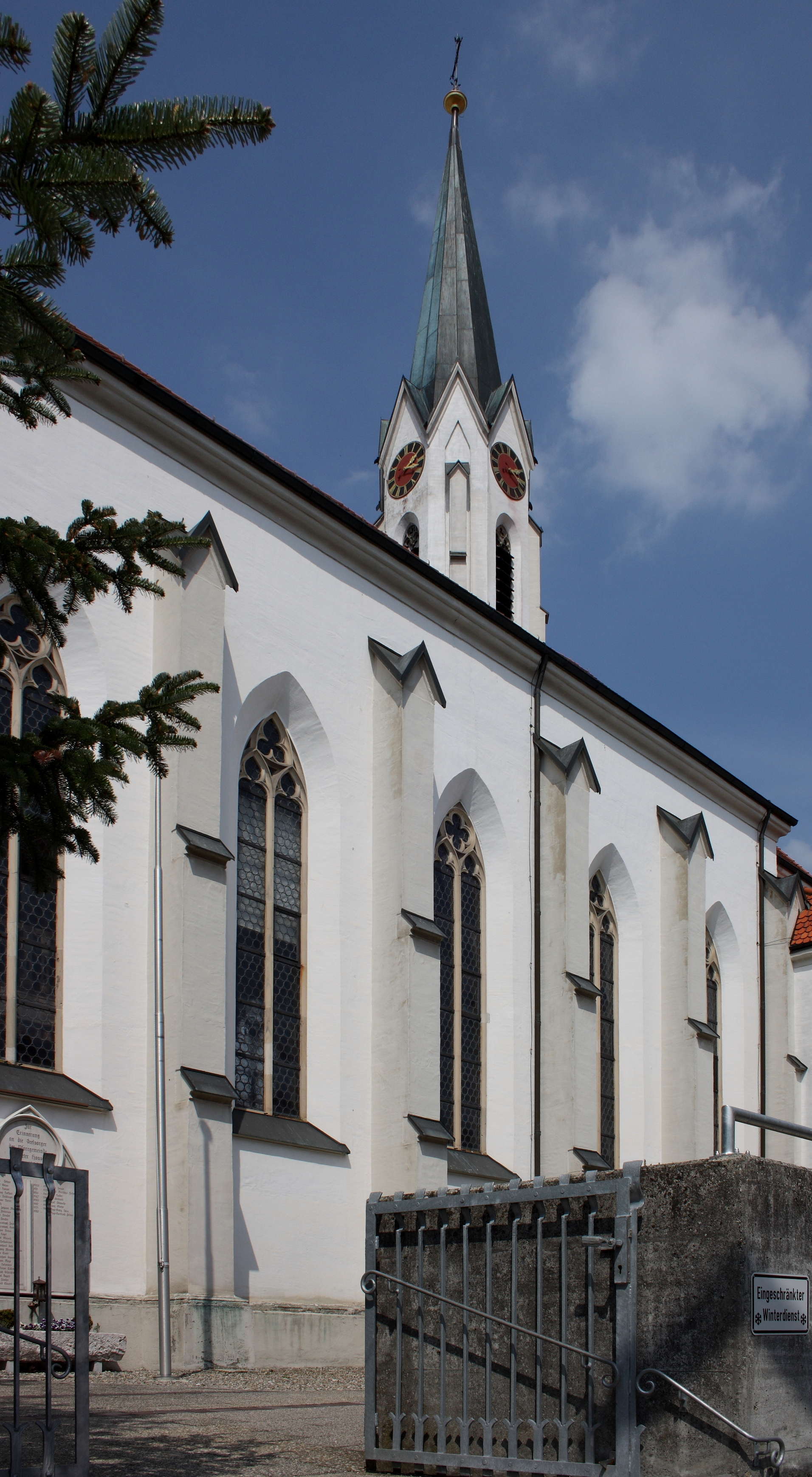 Katholische Pfarrkirche St. Peter und Paul in Hausen, einem Stadtteil von Dillingen im Landkreis Dillingen an der Donau (Bayern), Ansicht von Südwesten